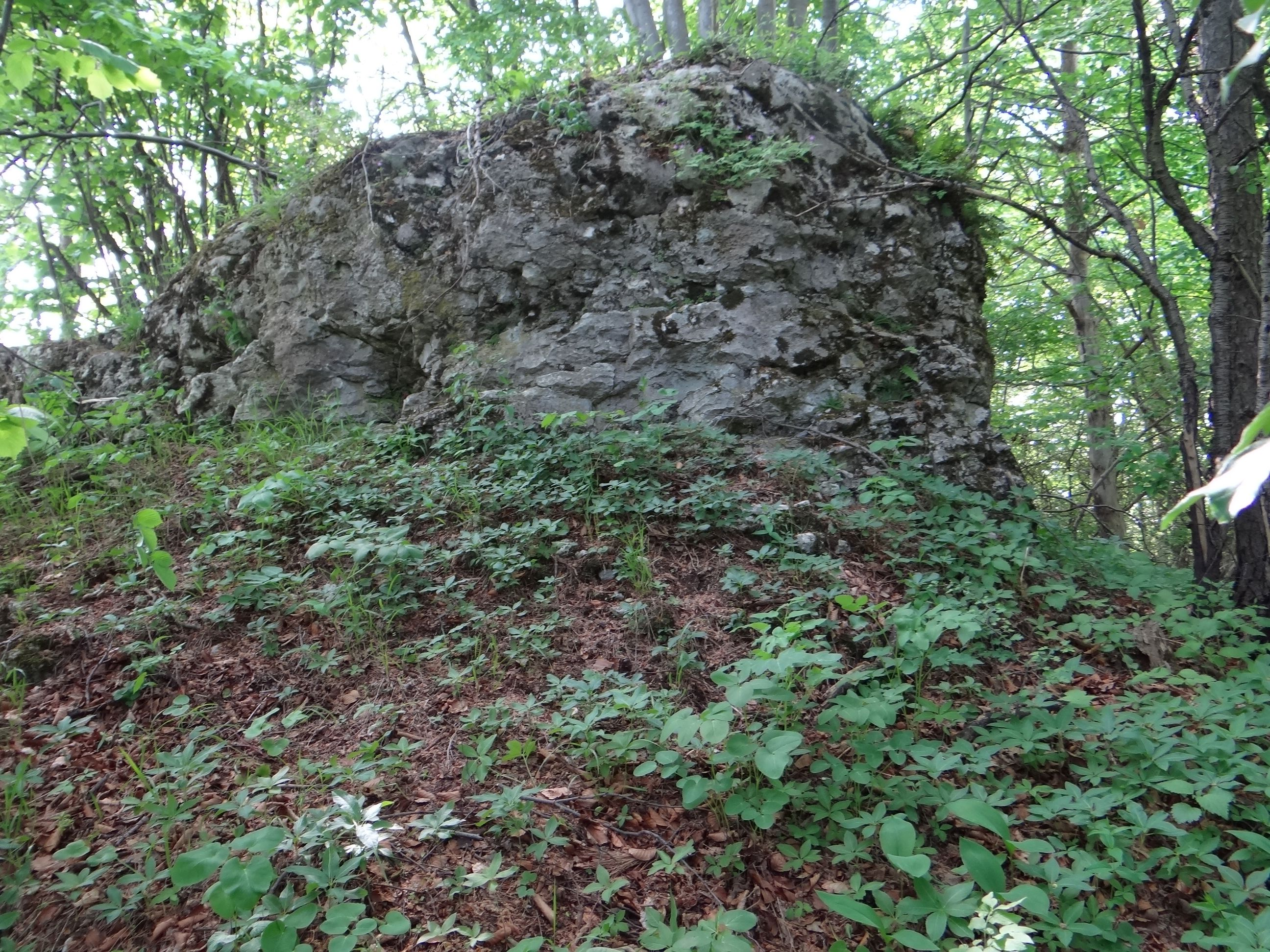 Kartynowa Skała w Śrubarni